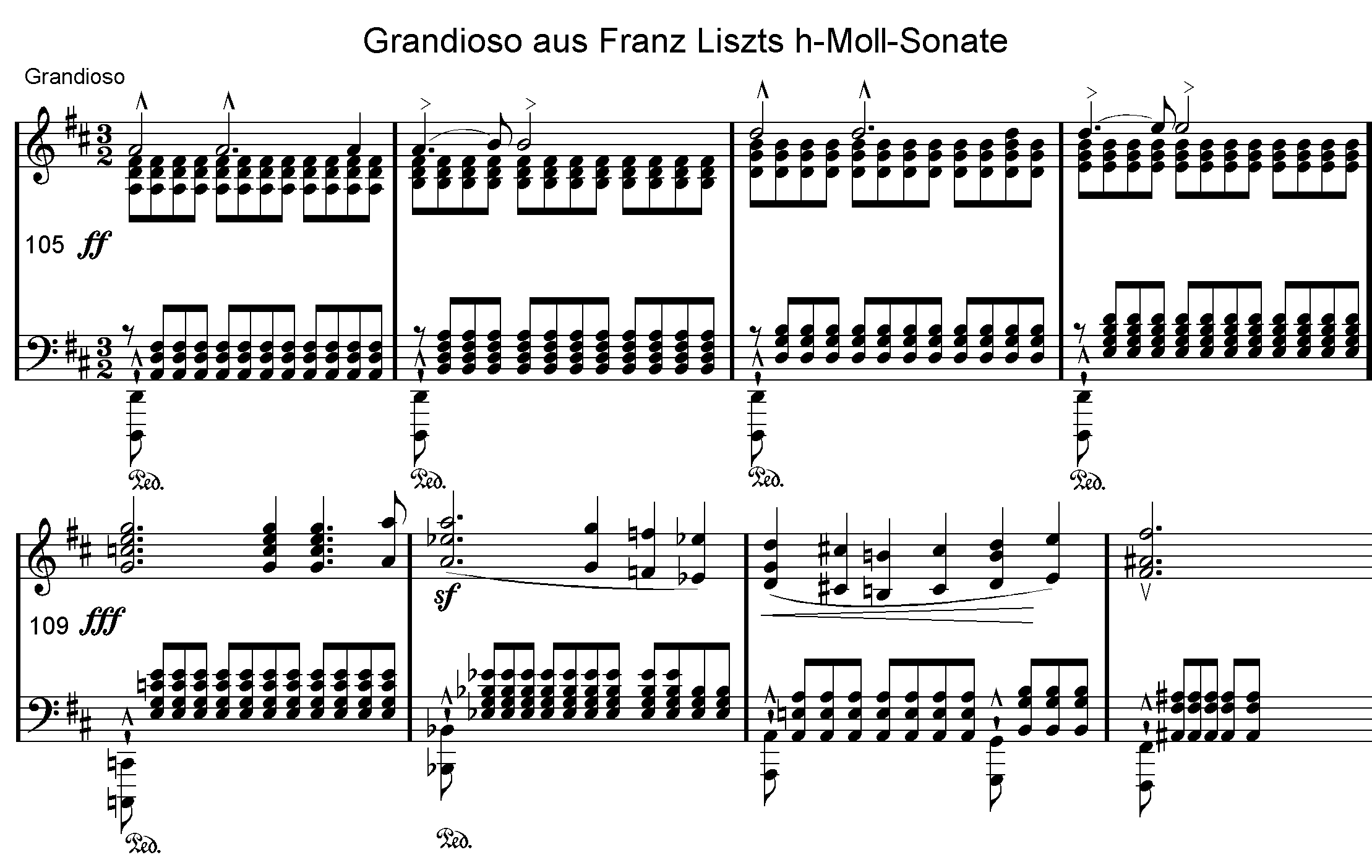 Grandioso aus Franz Liszts h-Moll-Sonate